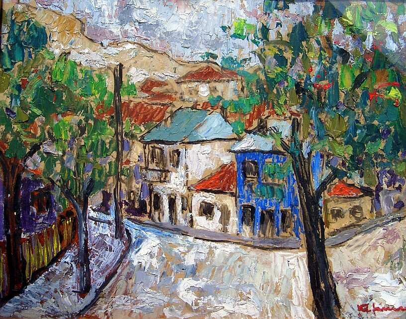 Landschaft Balcic, George Stefanescu, 1936, Öl/Malpappe, Privat Sammlung Dipl.Ing.Arch.Radu Stefanescu-Gross, Bukarest, Rumänien.